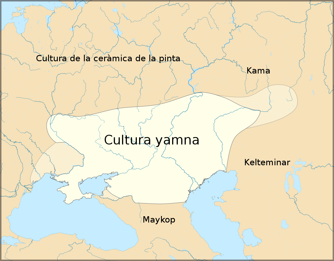 Cultures durant el període de les migracions indoàries